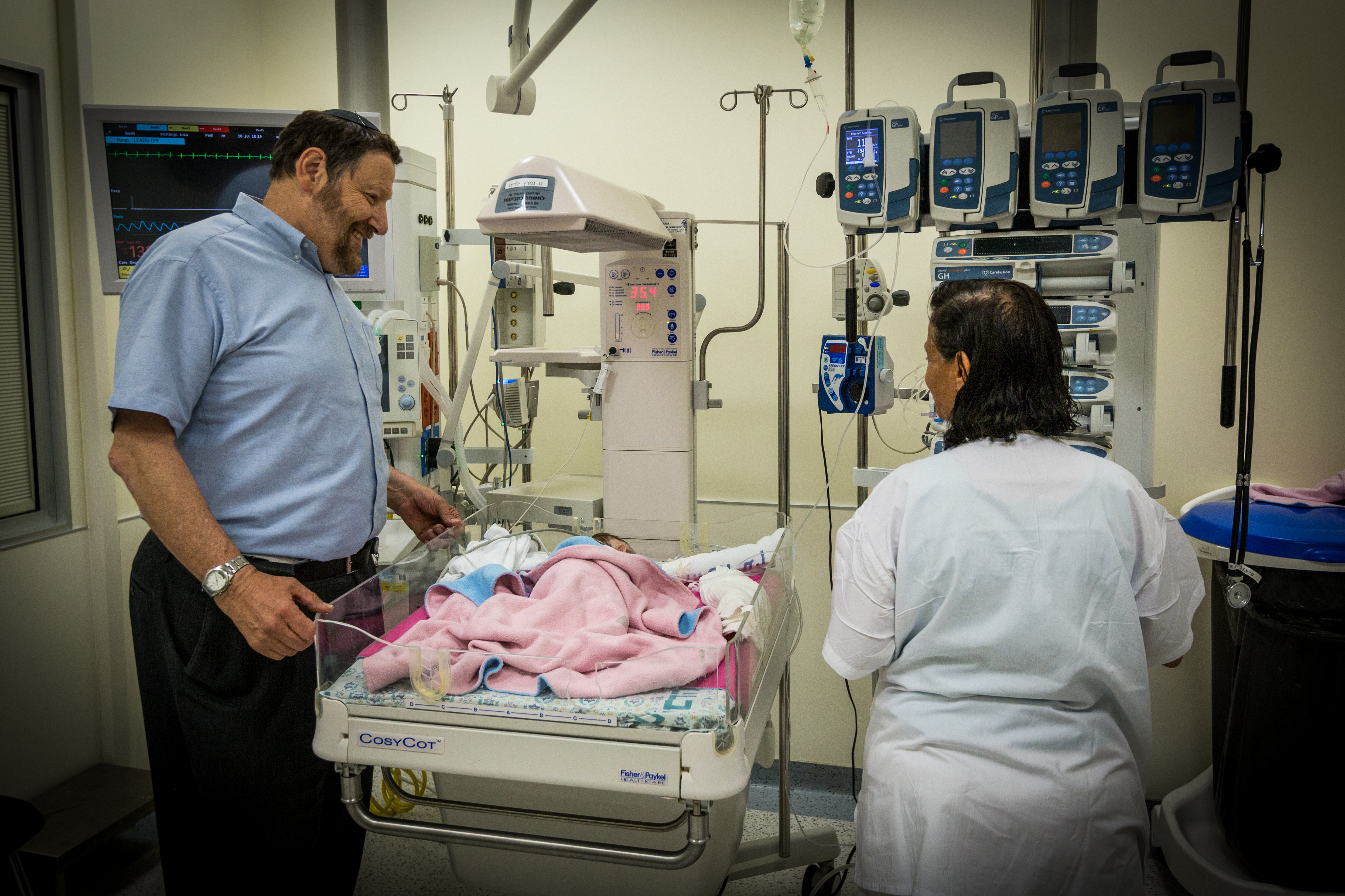 Jérusalem hôpital Hadassa Jean-Jacques Rein 10 juillet 2014